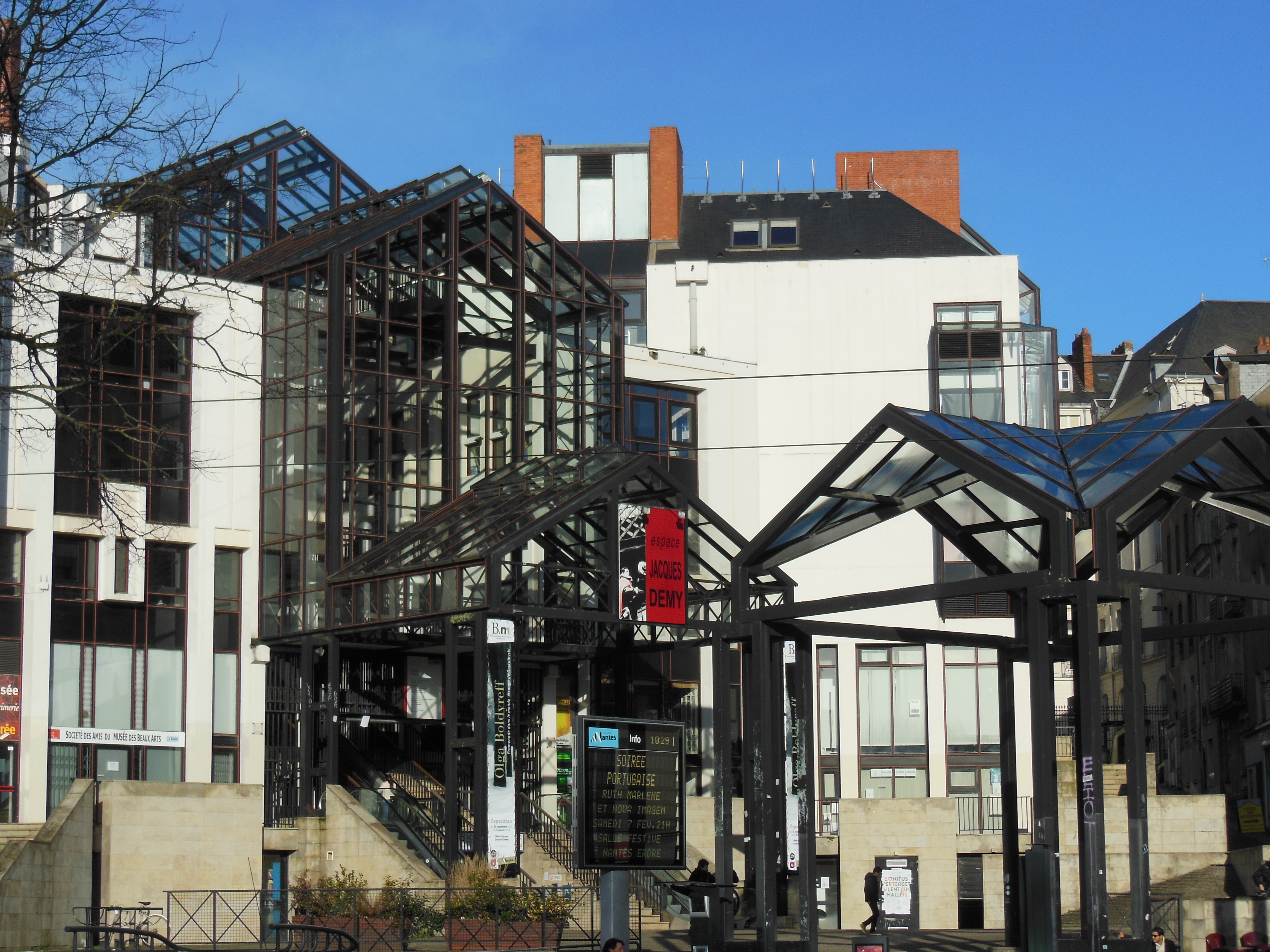 Médiathèque Jacques-Demy, Nantes, France